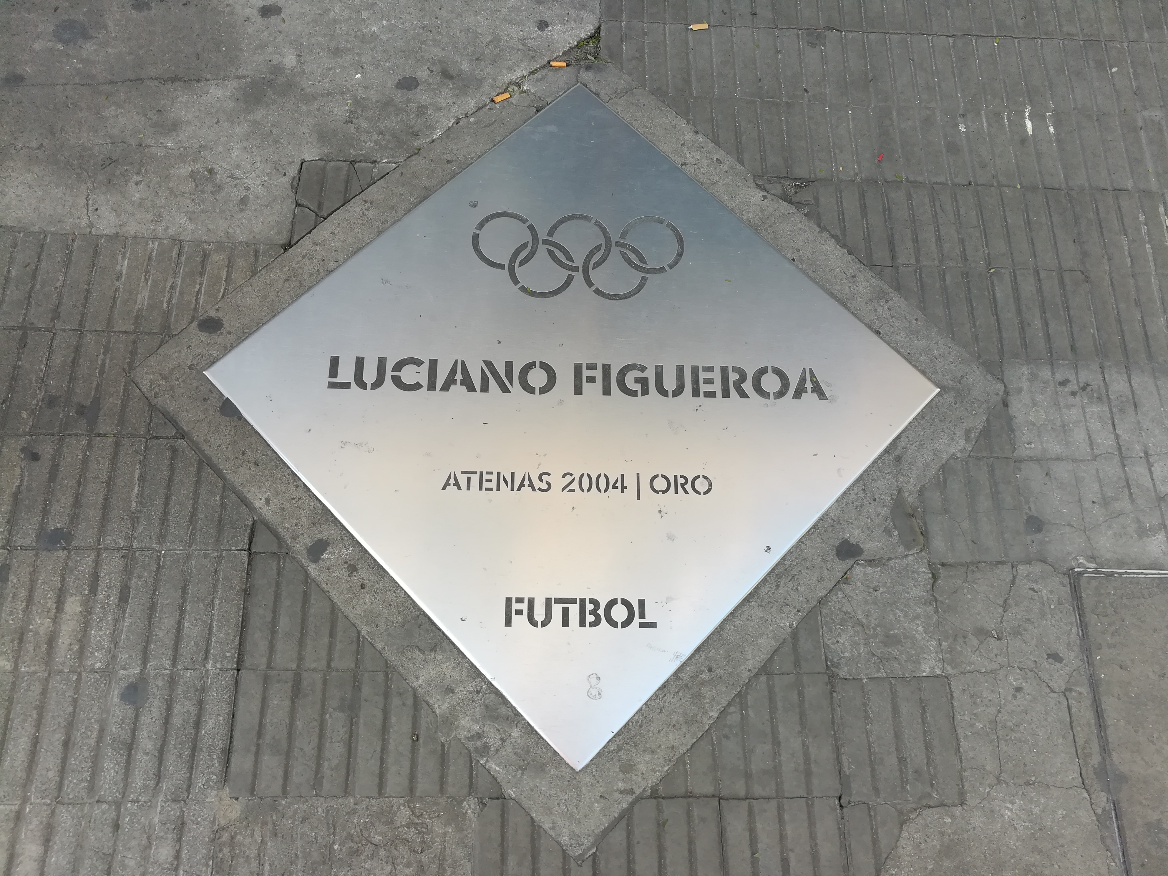 Paseo de los Olímpicos de los en la Avenida Pellegrini (Rosario).